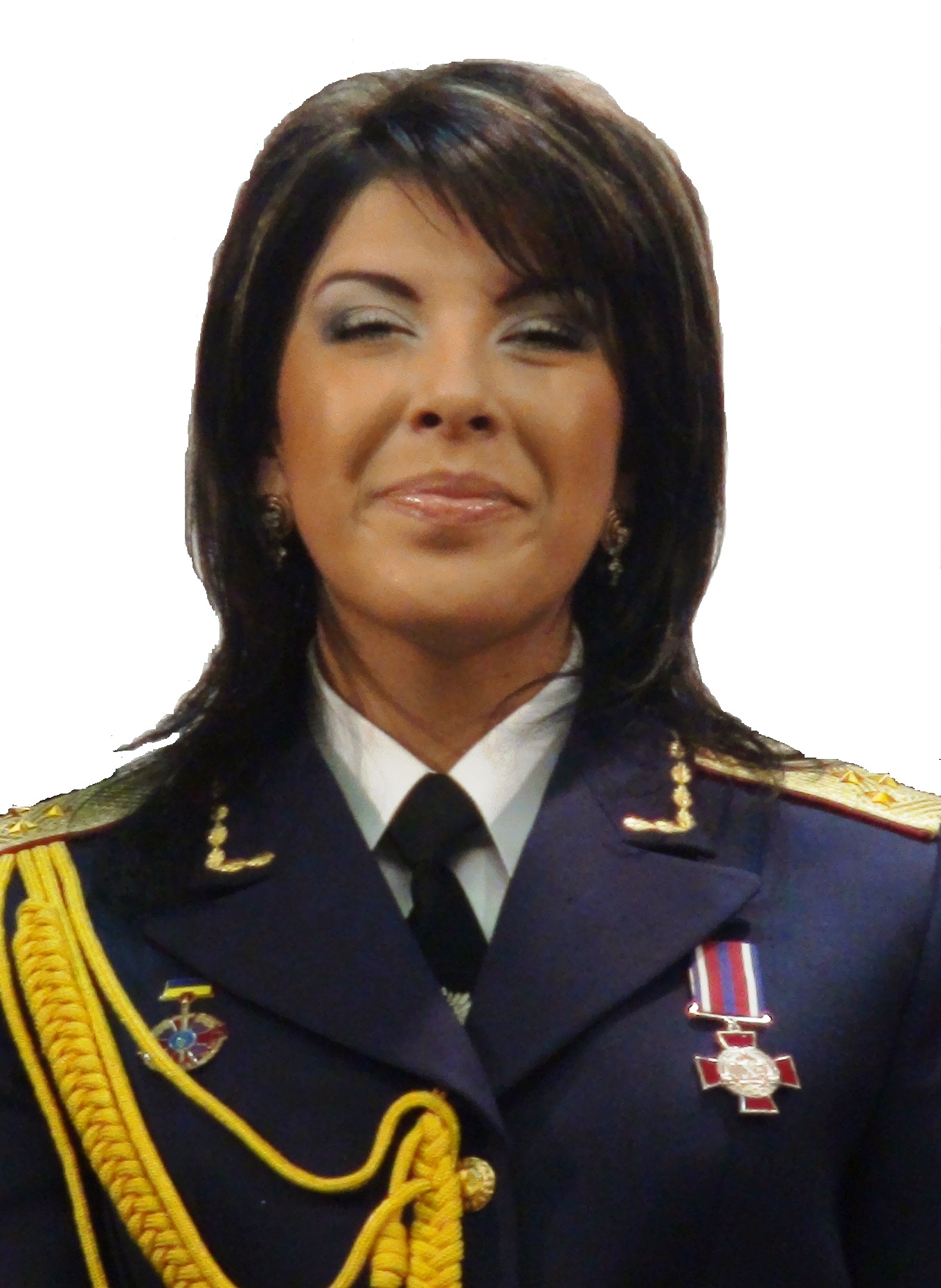 Елеонора Скиданова в парадній формі офіцера внутрішніх військ МВС України, Київ, 2010 рік